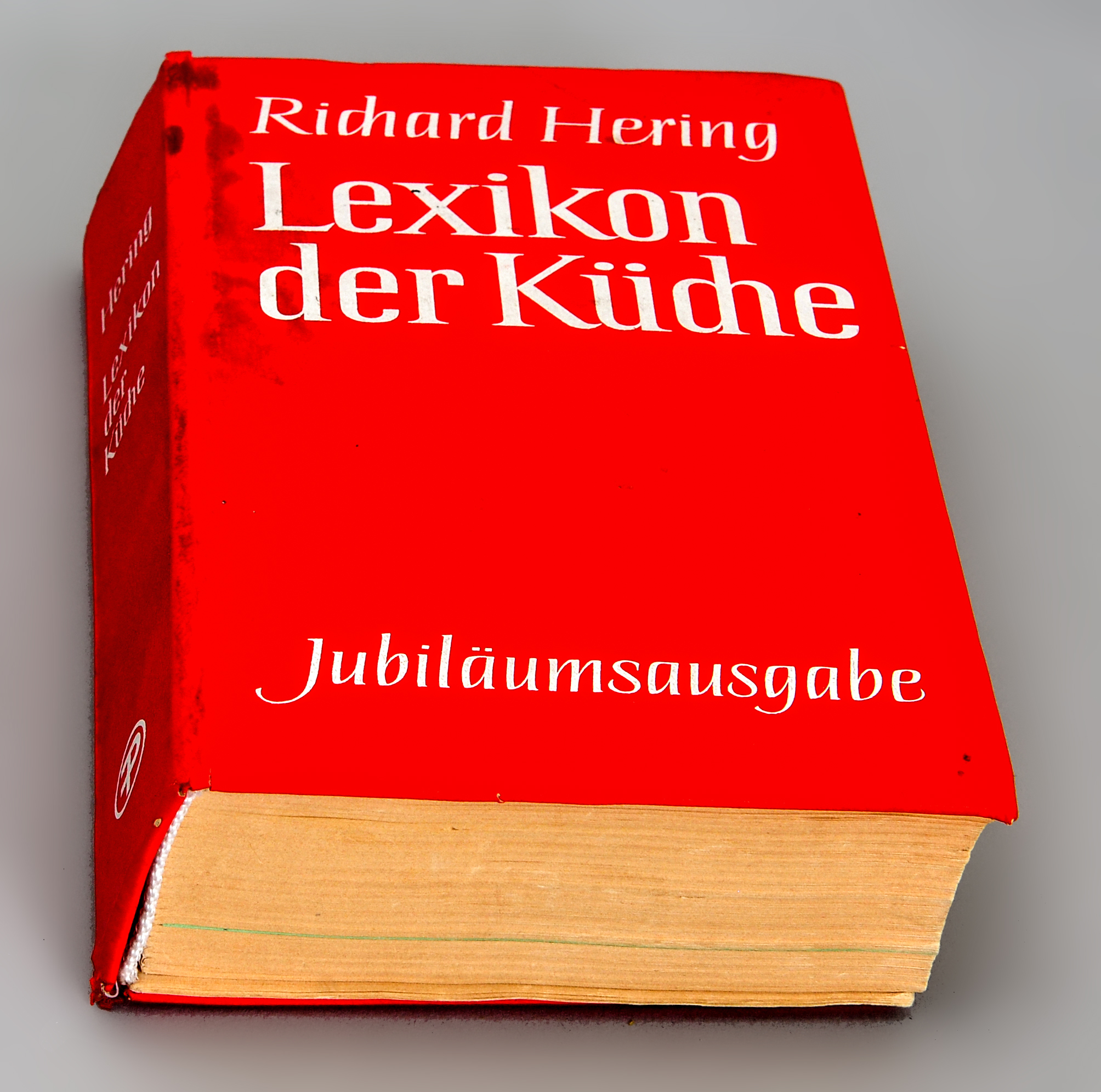 Lexikon der Küche, Richard Hering; Treffen der Redaktion Essen und Trinken ion Wien